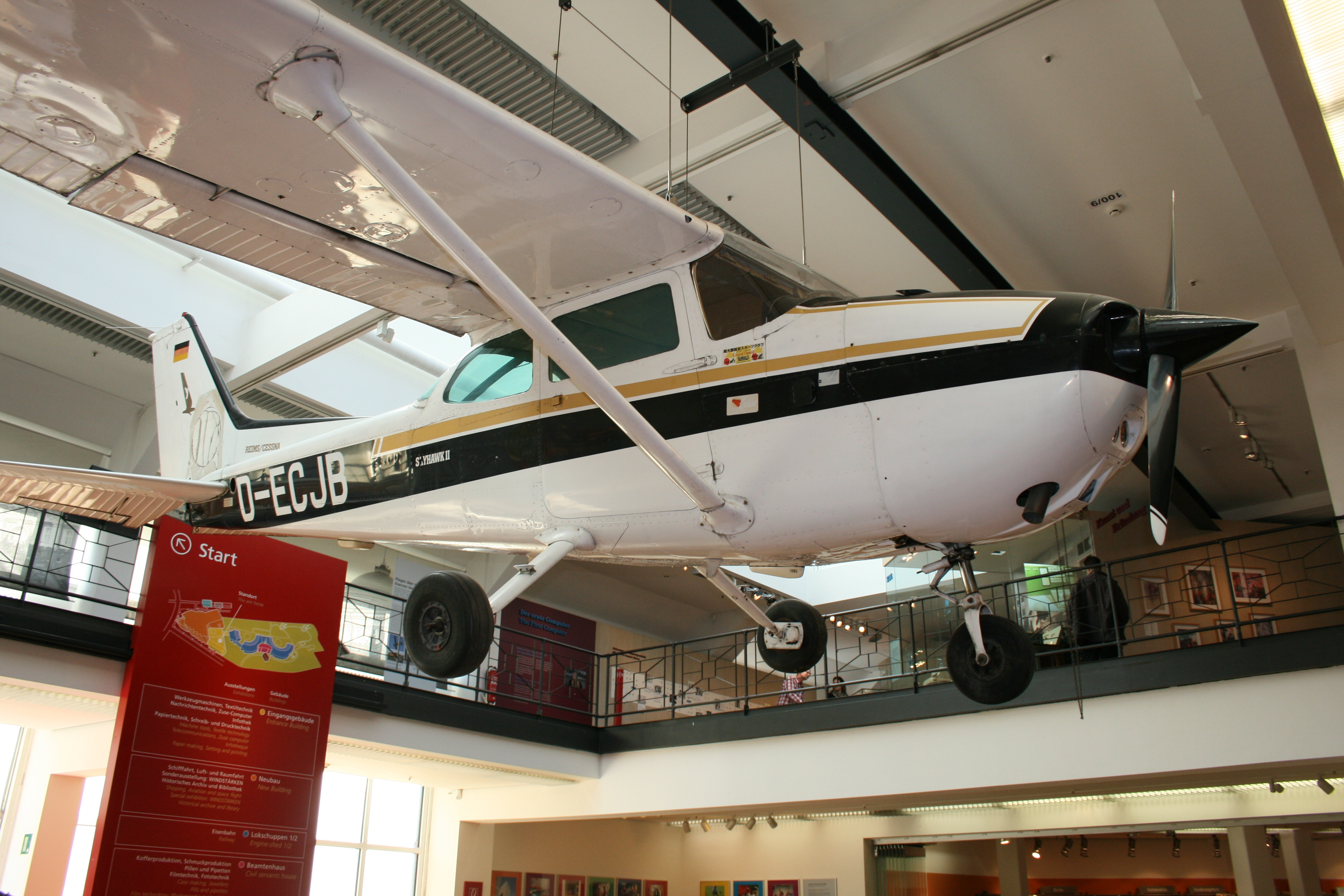 Die Cessna mit der Mathias Rust in Moskau landete im Deutschen Technikmuseum Berlin